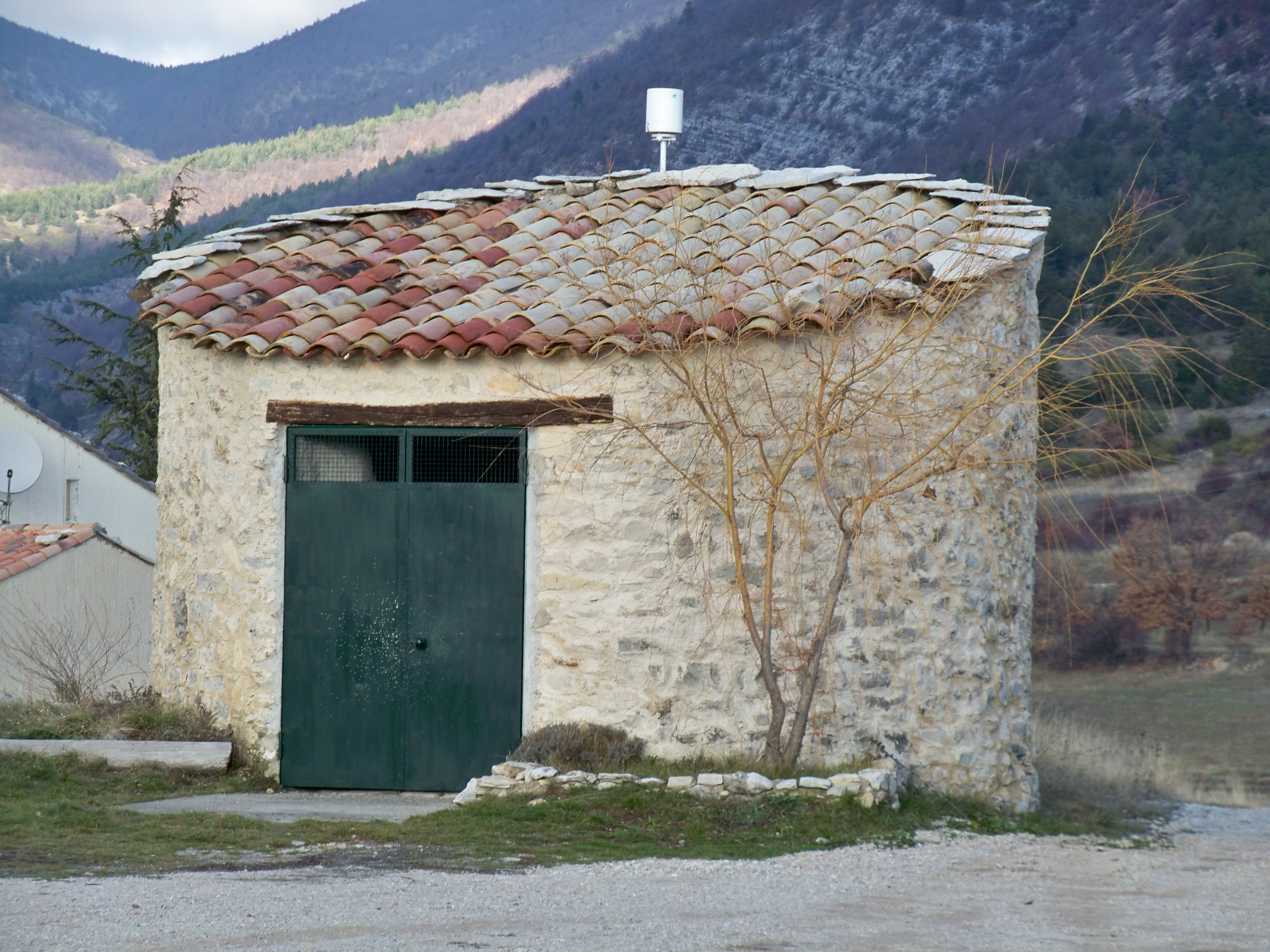 Ancienne tour à l'Hospitalet (04), France